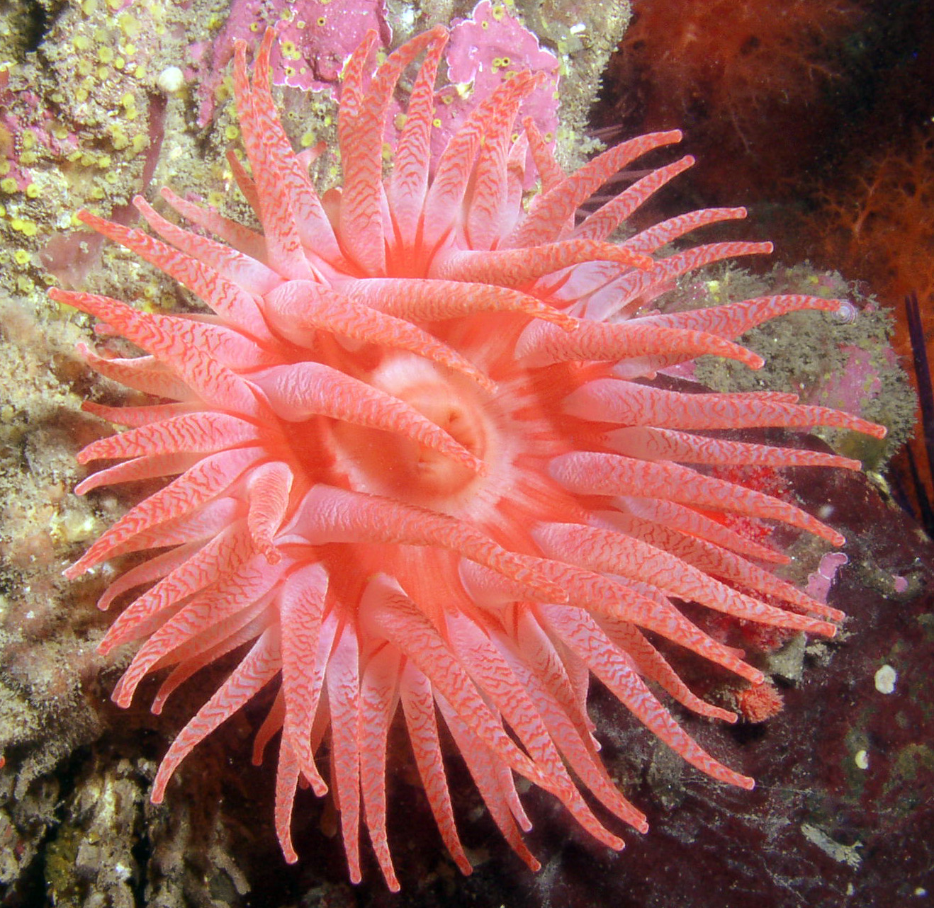 The crimson anemone, Cribrinopsis fernaldi.